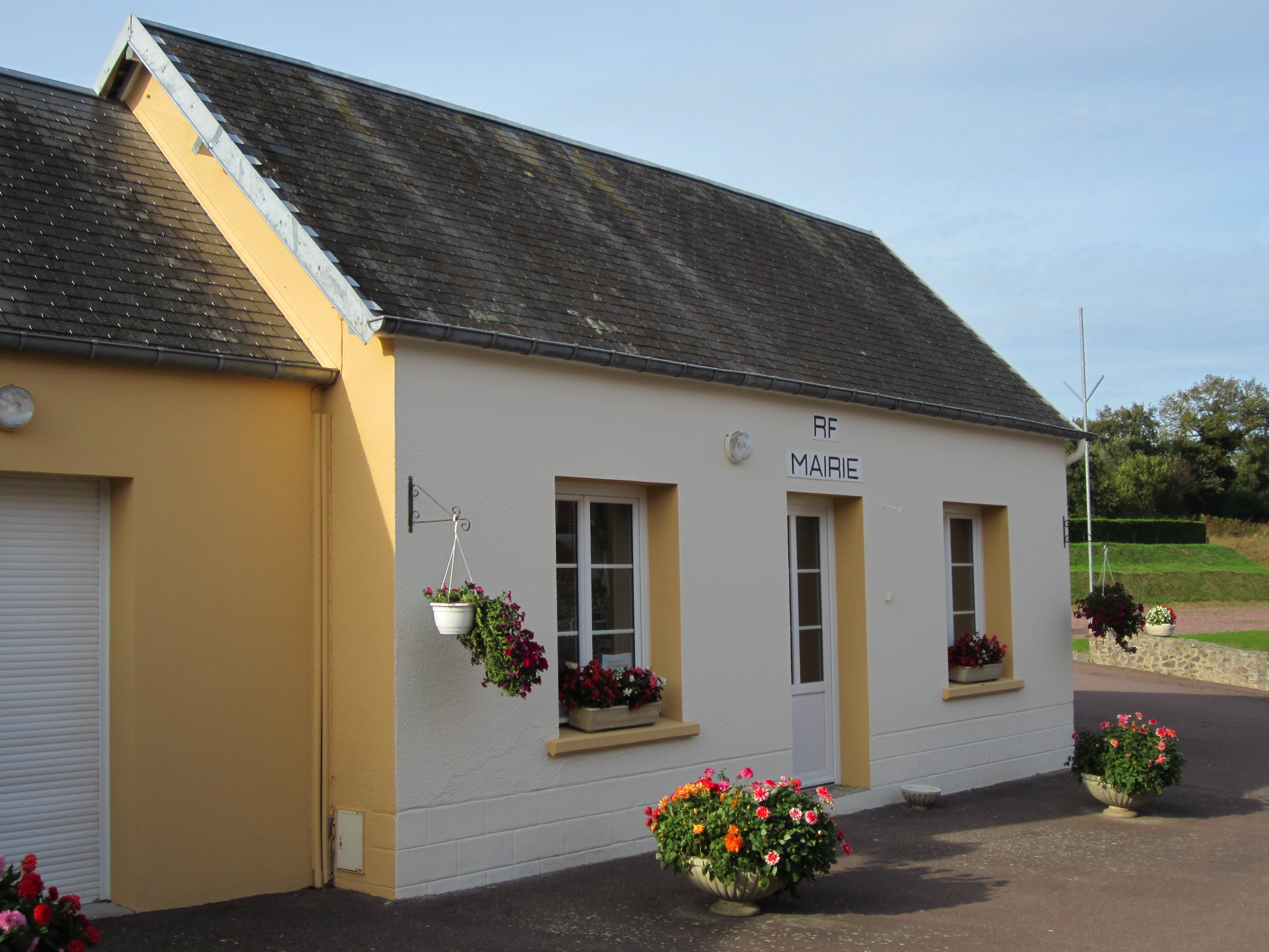 Ancteville, Manche